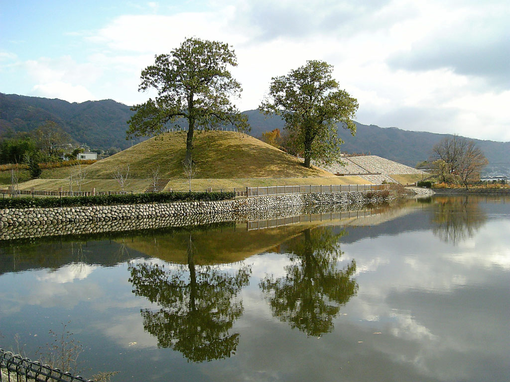 Shionjiyama kofun in Yao, Osaka, Japan